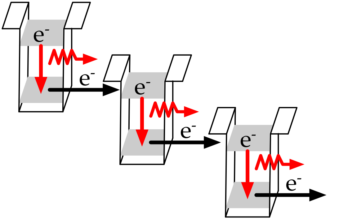 Het cascade-effect. De horizontale dikke zwarte pijlen duiden de tunneling aan, terwijl de verticale de energieval aangeven, waarbij een foton (de rode pijl) wordt uitgezonden. Licensing Creator: Yannick Clybouw